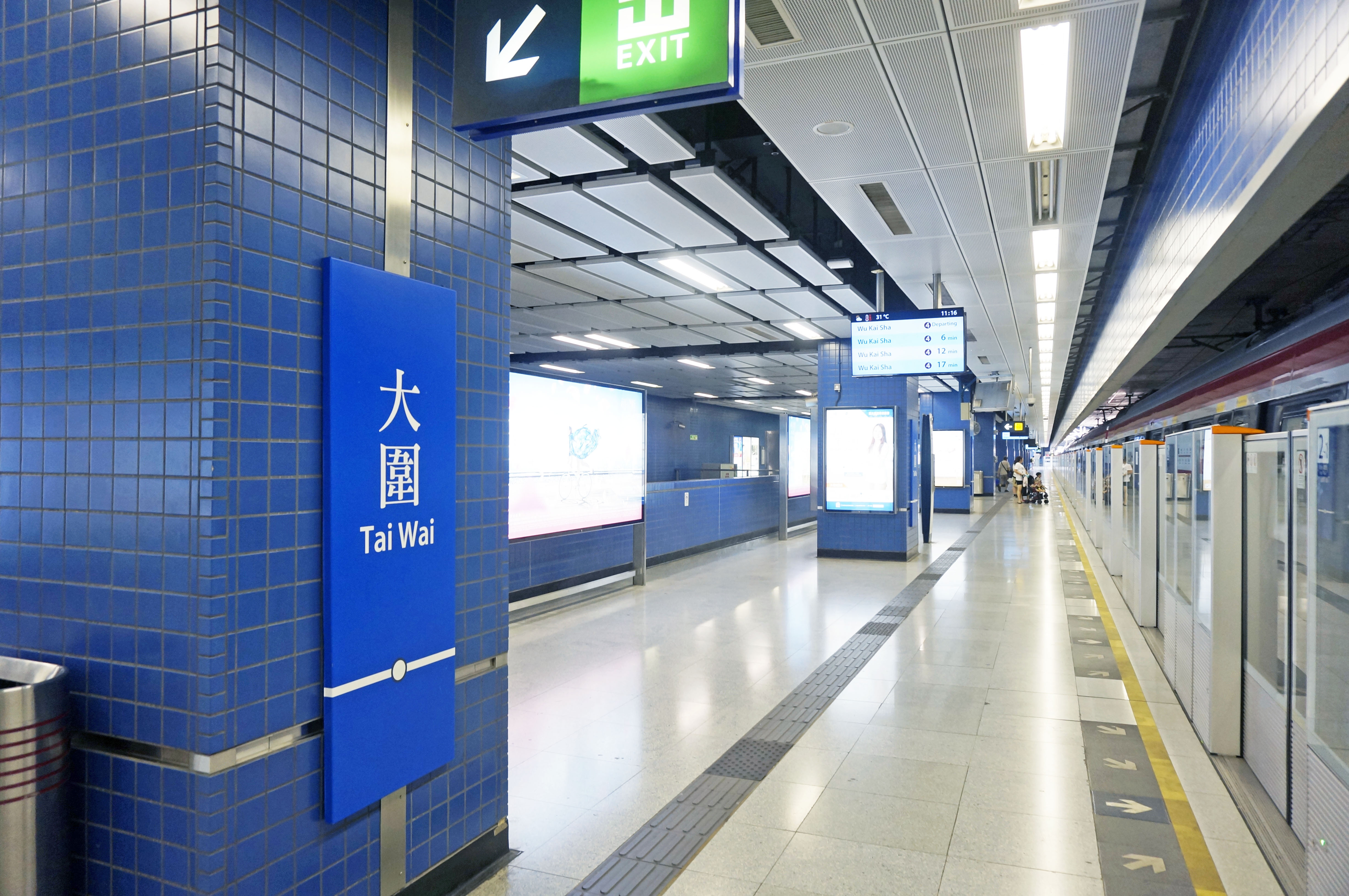 港鐵大圍站月台